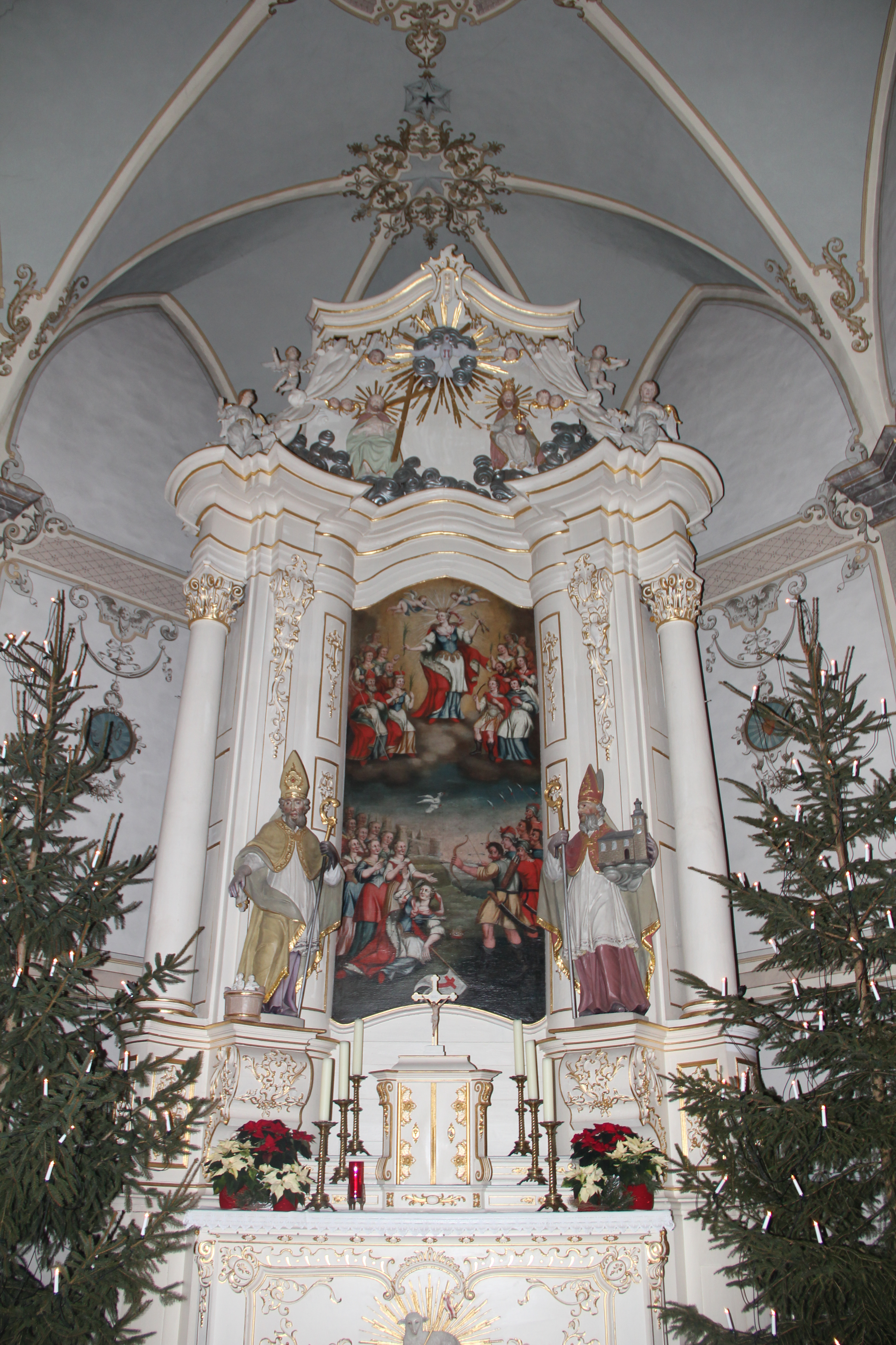 Hochaltar der Kirche St. Ursula in Meiste zur Weihnachtszeit